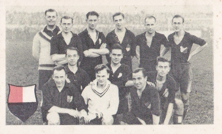 HBS Den Haag, Eerste Klasse West, 1931-1932. v.d. Bergen, van Romondt, Ophorst, van Kesteren, d'Fonseca, Diehl, Schoorl, Arntzenius, Denis, Vermetten, Rambonnet